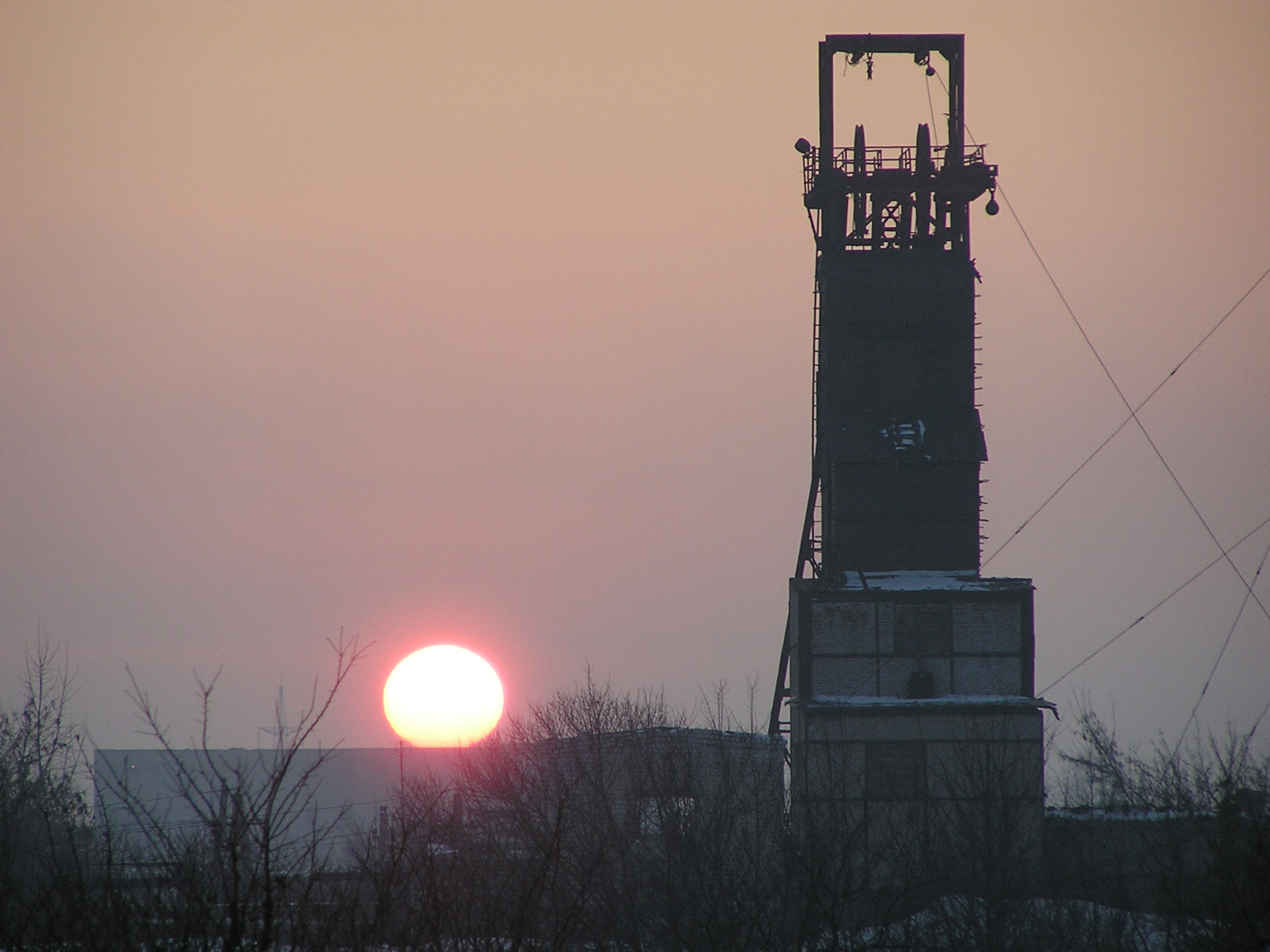 Донецк. Шахта на Лидиевке